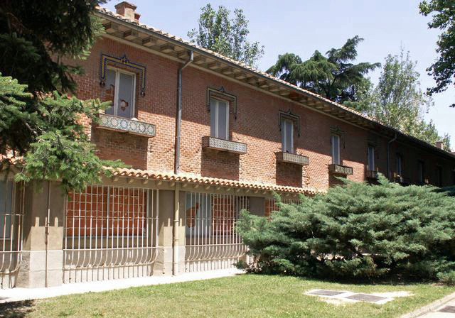 "La Leonera" de la antigua Casa de Fieras del Retiro, donde se encontraban las jaulas de los felinos, en el Parque del Buen Retiro, actualmente Jardines del arquitecto Herrero Palacios.